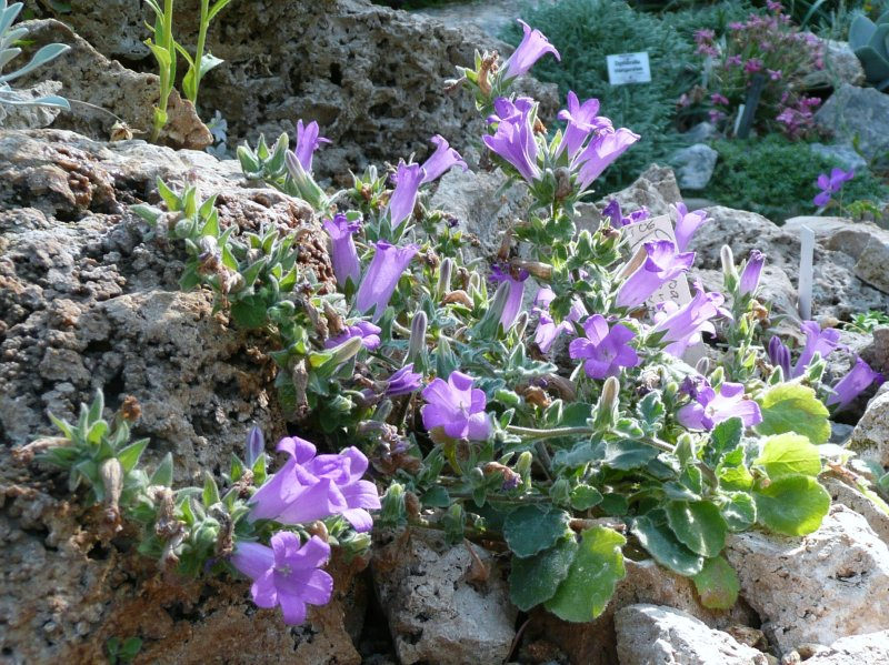 Campanula in Botanischer Garten Erlangen, 2008